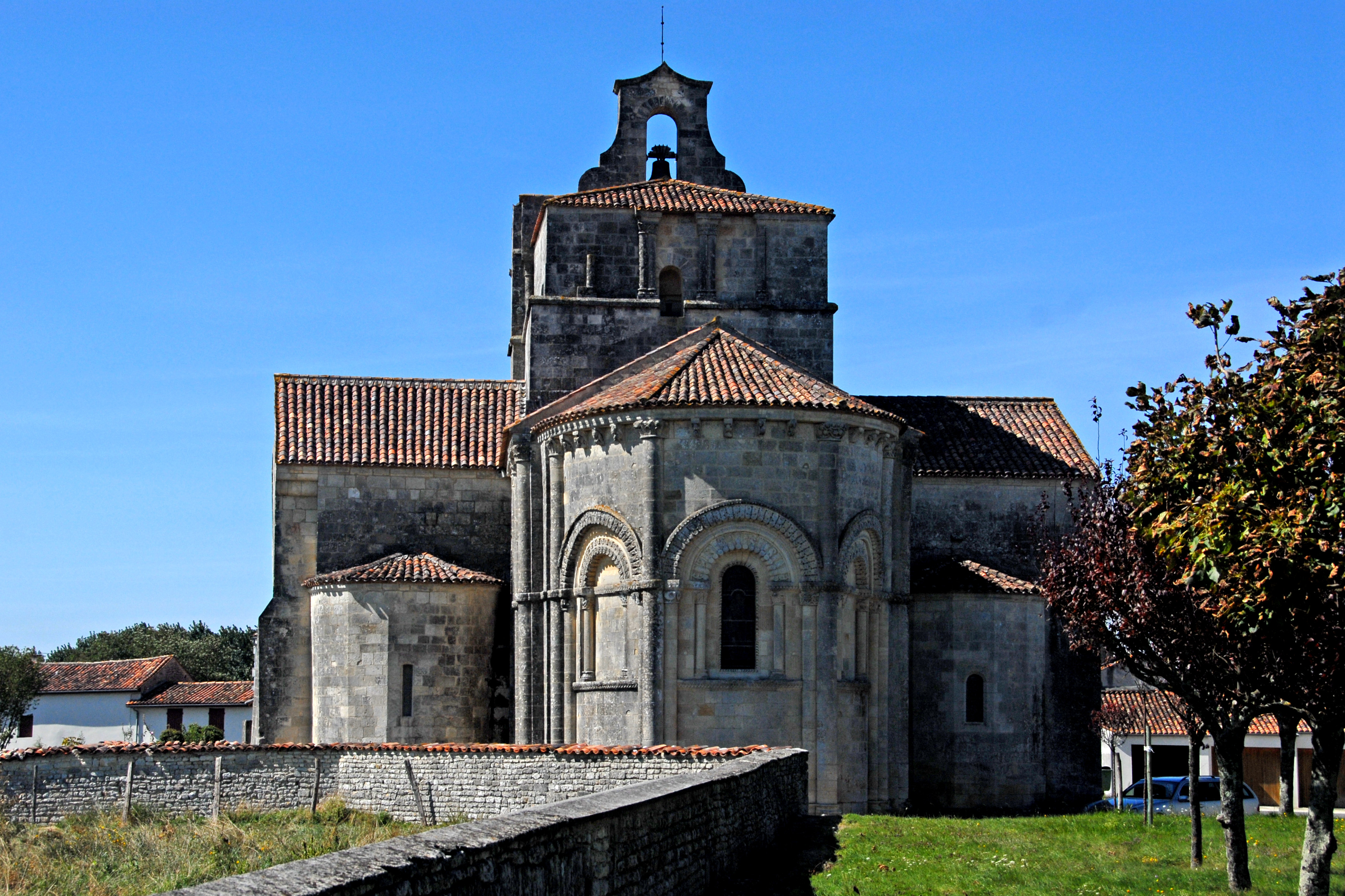 St.-Pierre-de-Marestay, Chorgesims, Kragsteine